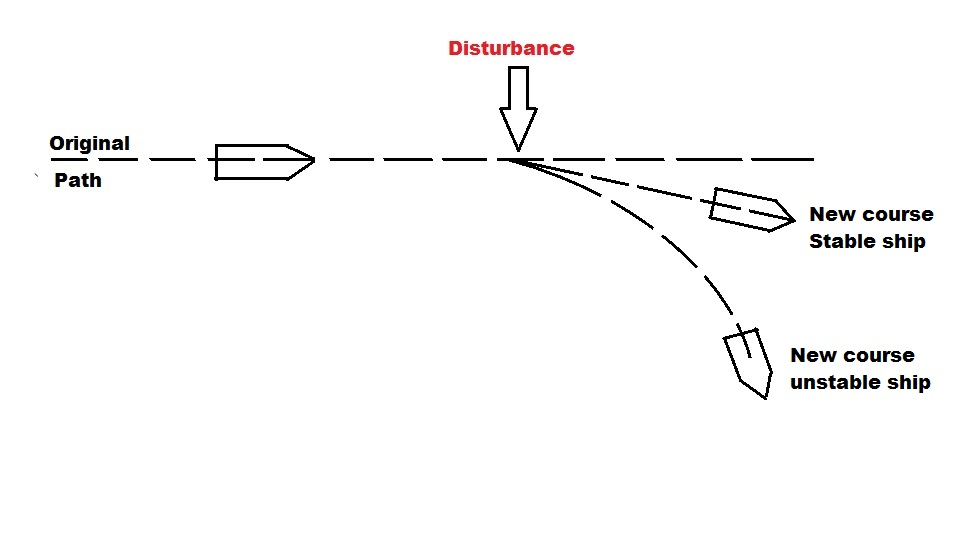 Indien het schip verstoord wordt door een externe factor, gaat het schip een andere, evenwijdige koers volgen.